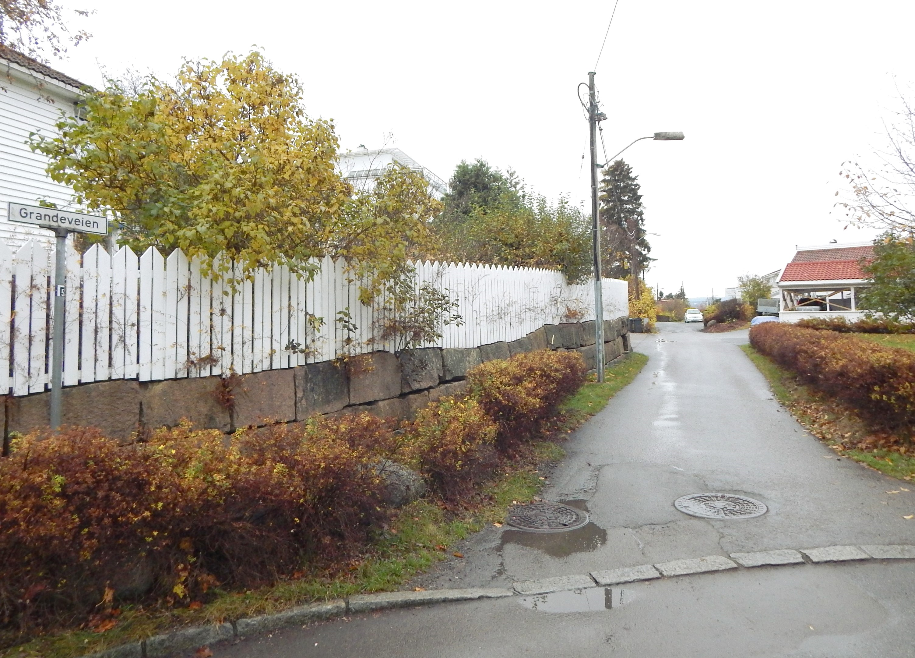 Grandeveien